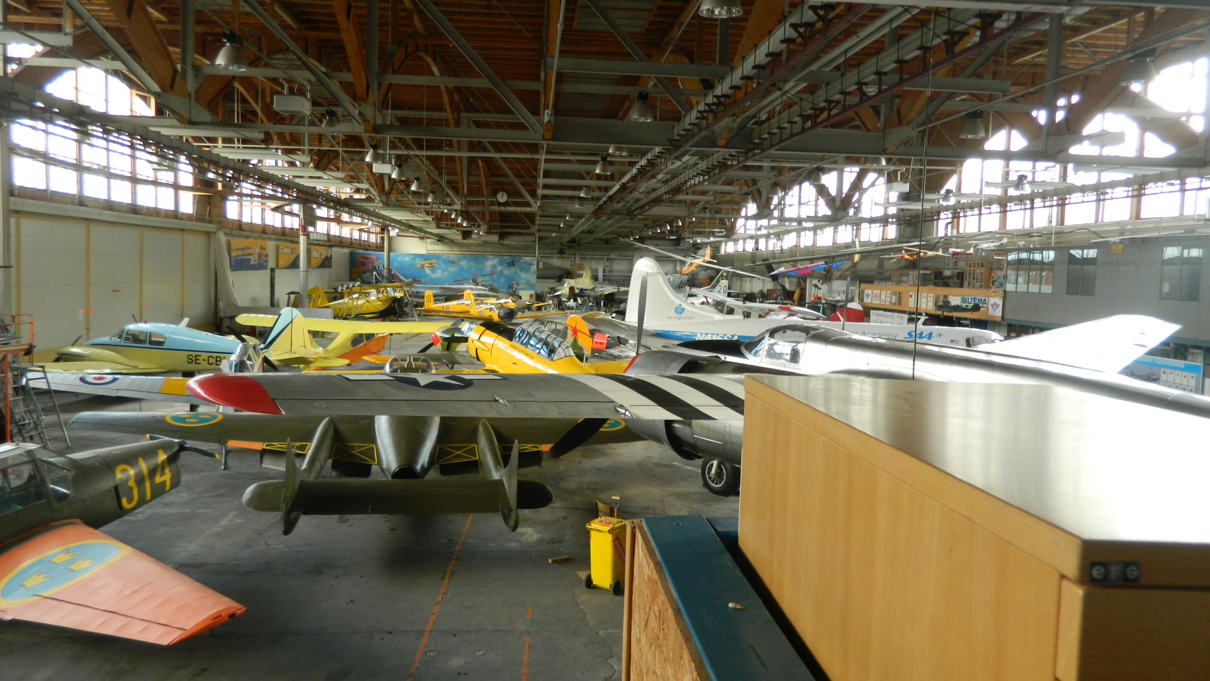 The hangar at Västerås Flight Museum, Sweden